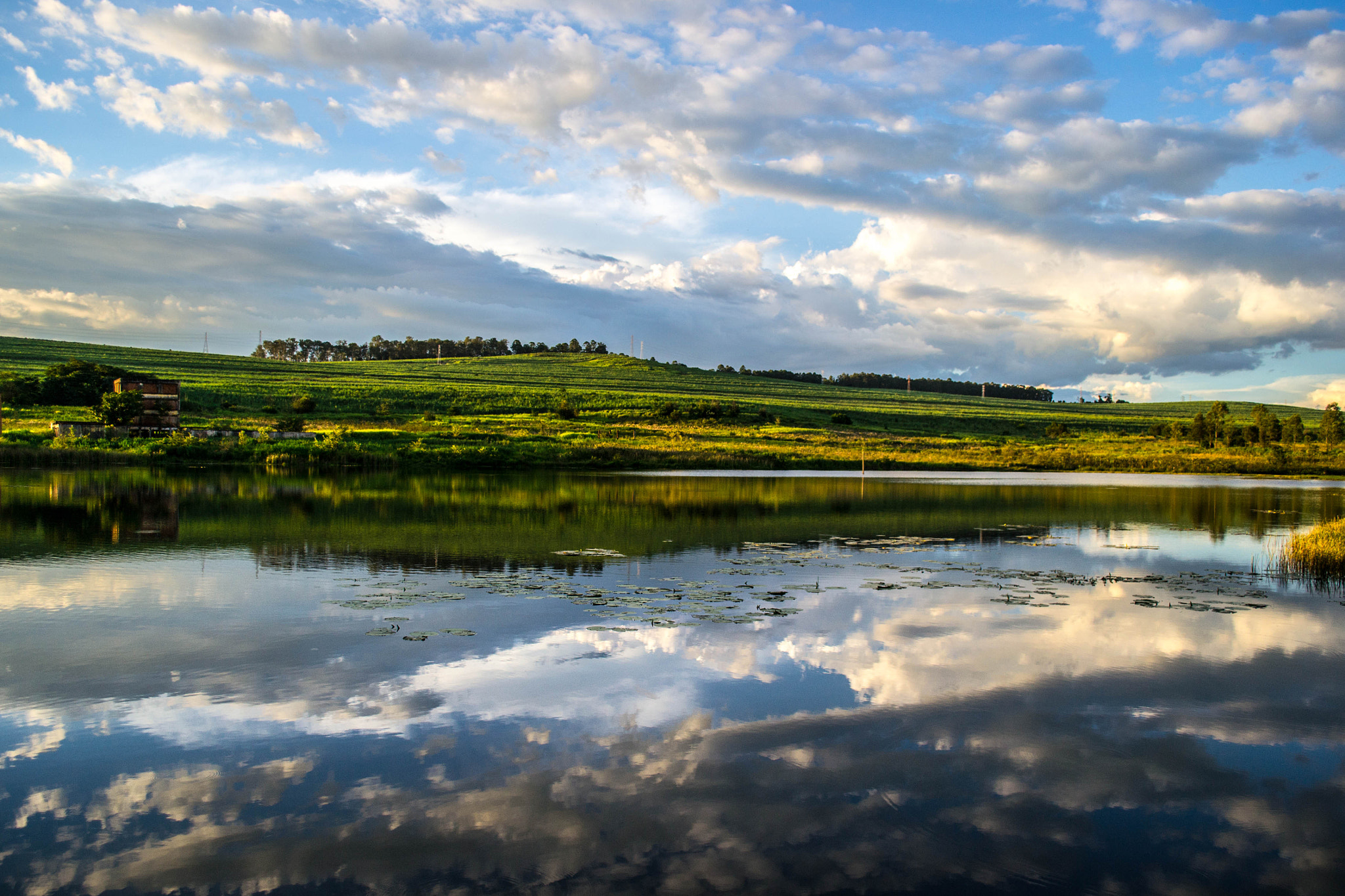 500px provided description: Lago no meio do canavial. Rio Claro SP [#agua ,#lago ,#espelho ,#rio claro ,#horto ,#canavial ,#feena ,#espelho dgua]